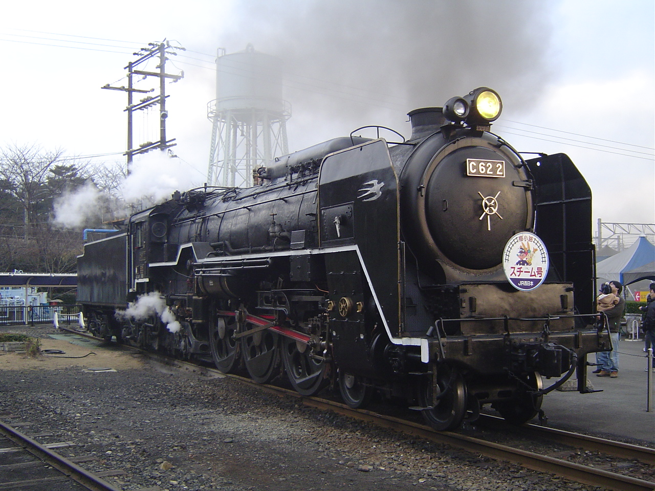 西日本旅客鉄道（JR西日本）C62形蒸気機関車（C622）